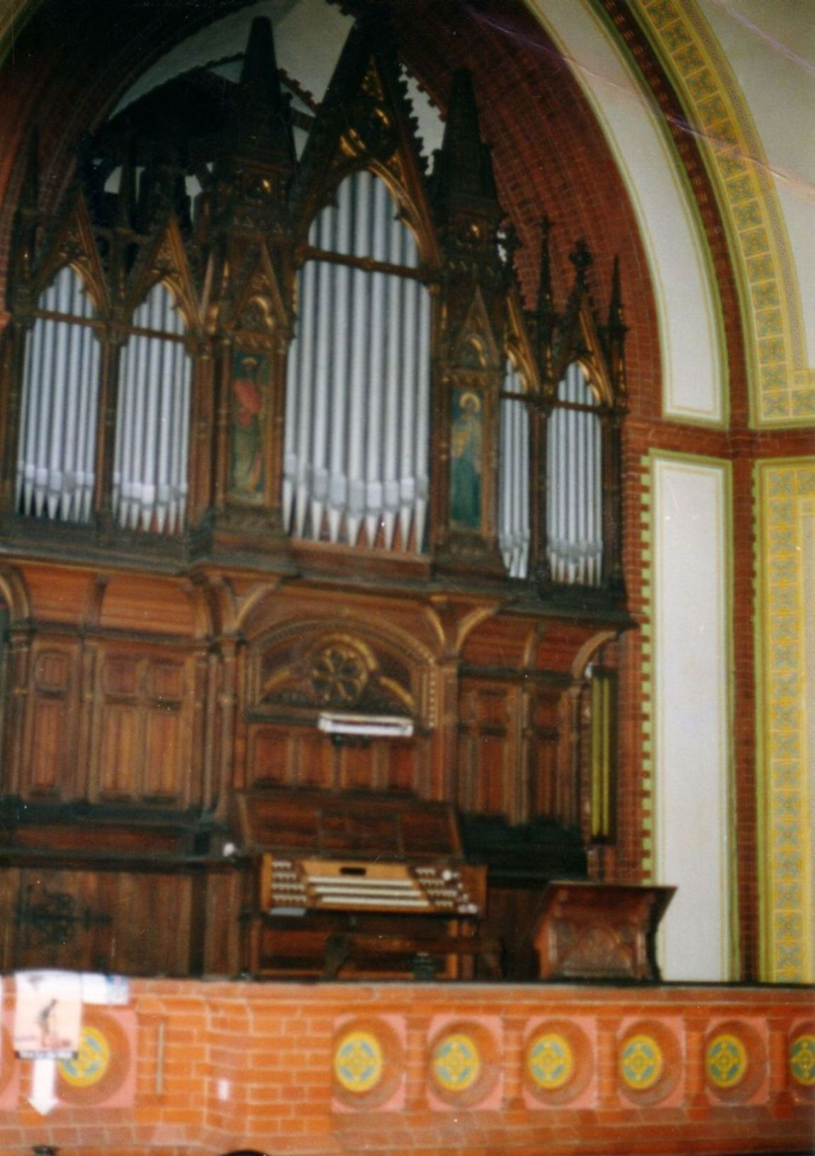 Sauer-Orgel der Heilandskirche Leipzig-Plagwitz